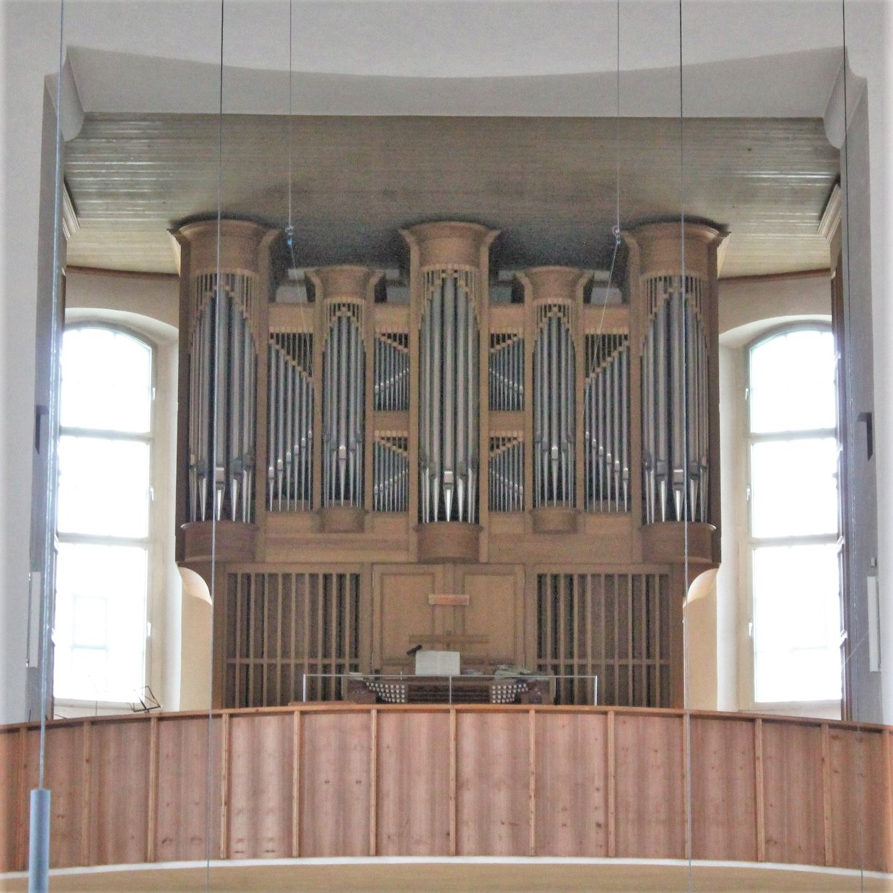 Orgel der Christkönigkirche in München